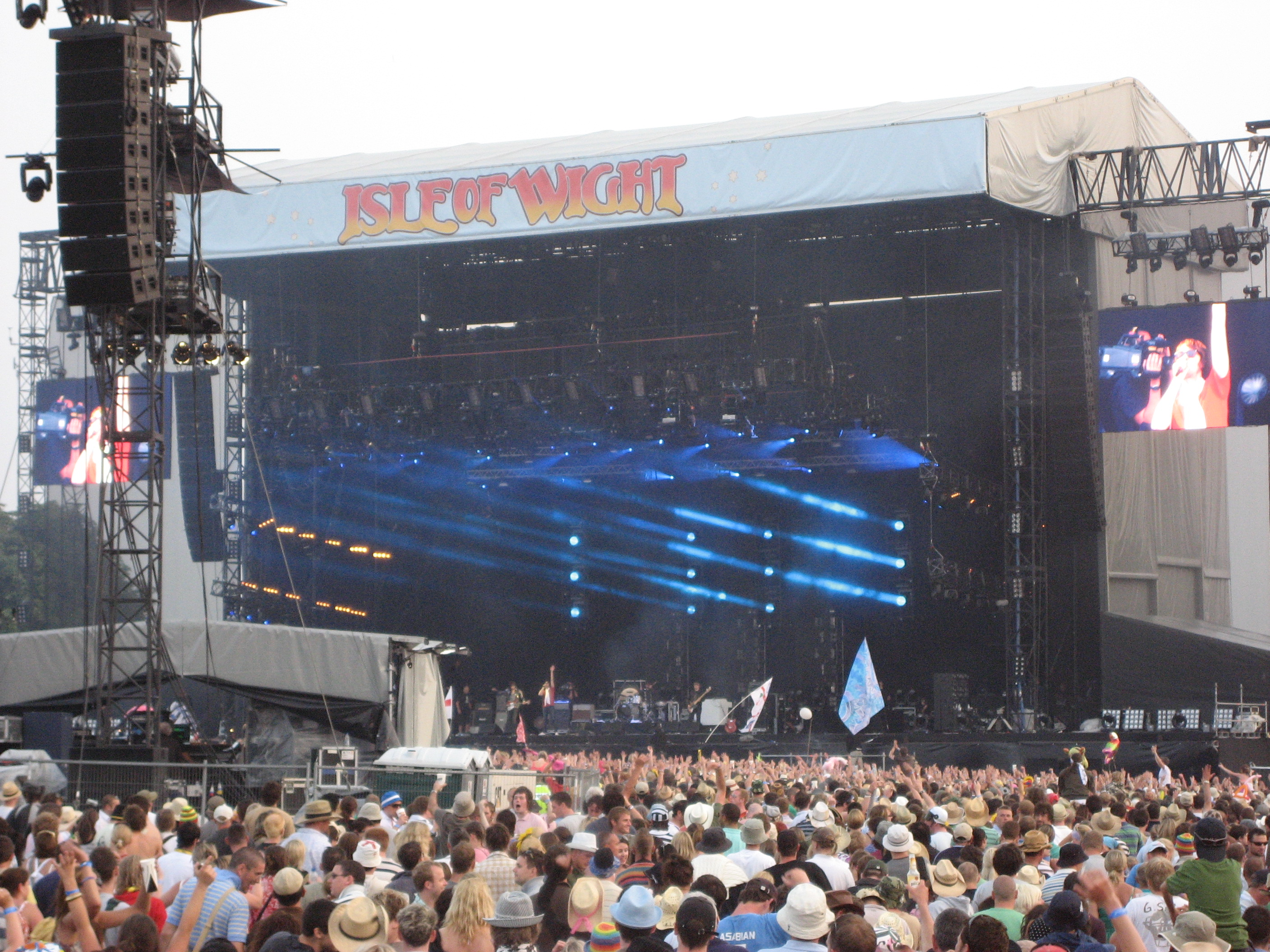 Kasabian on stage